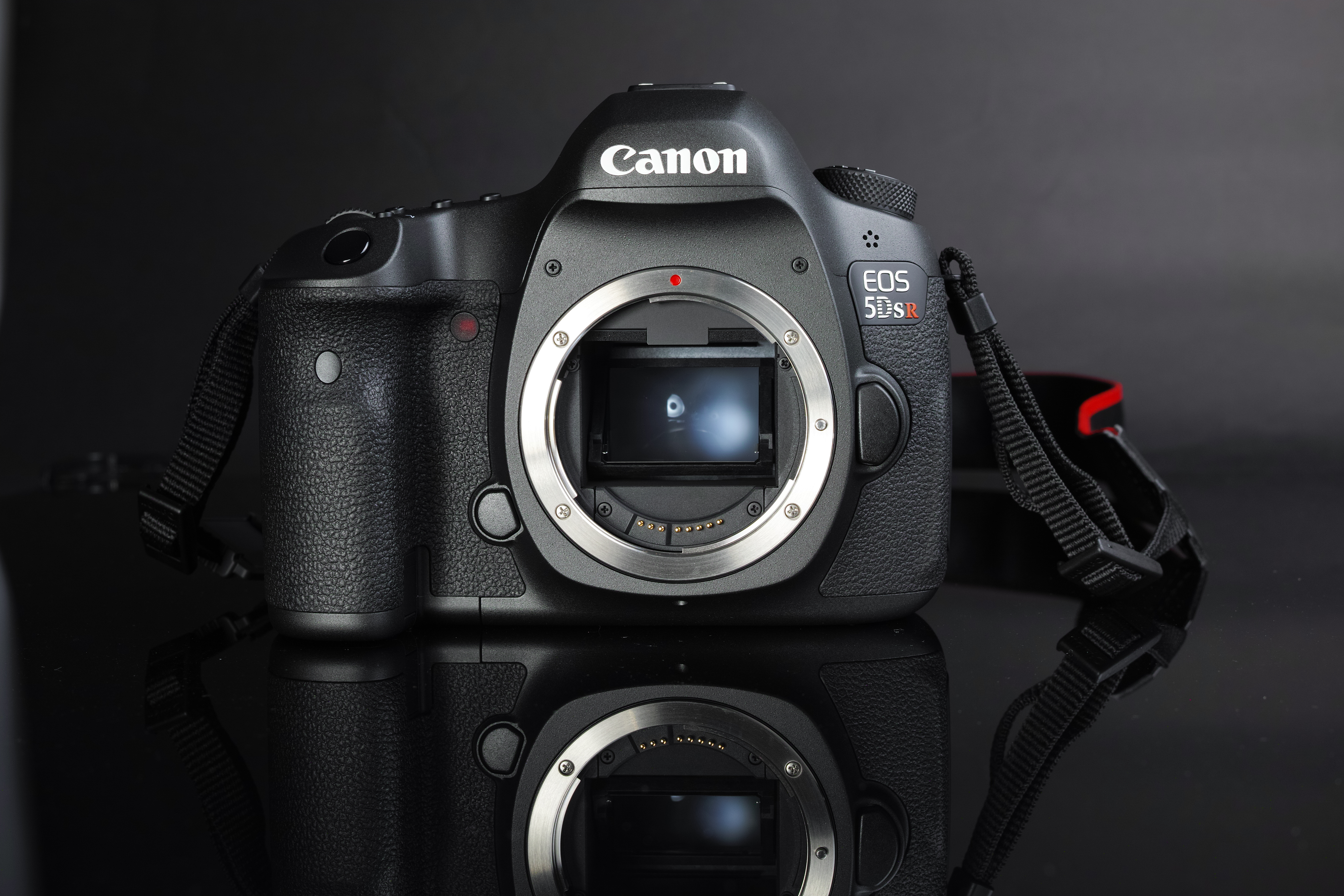 5DSR寫真集